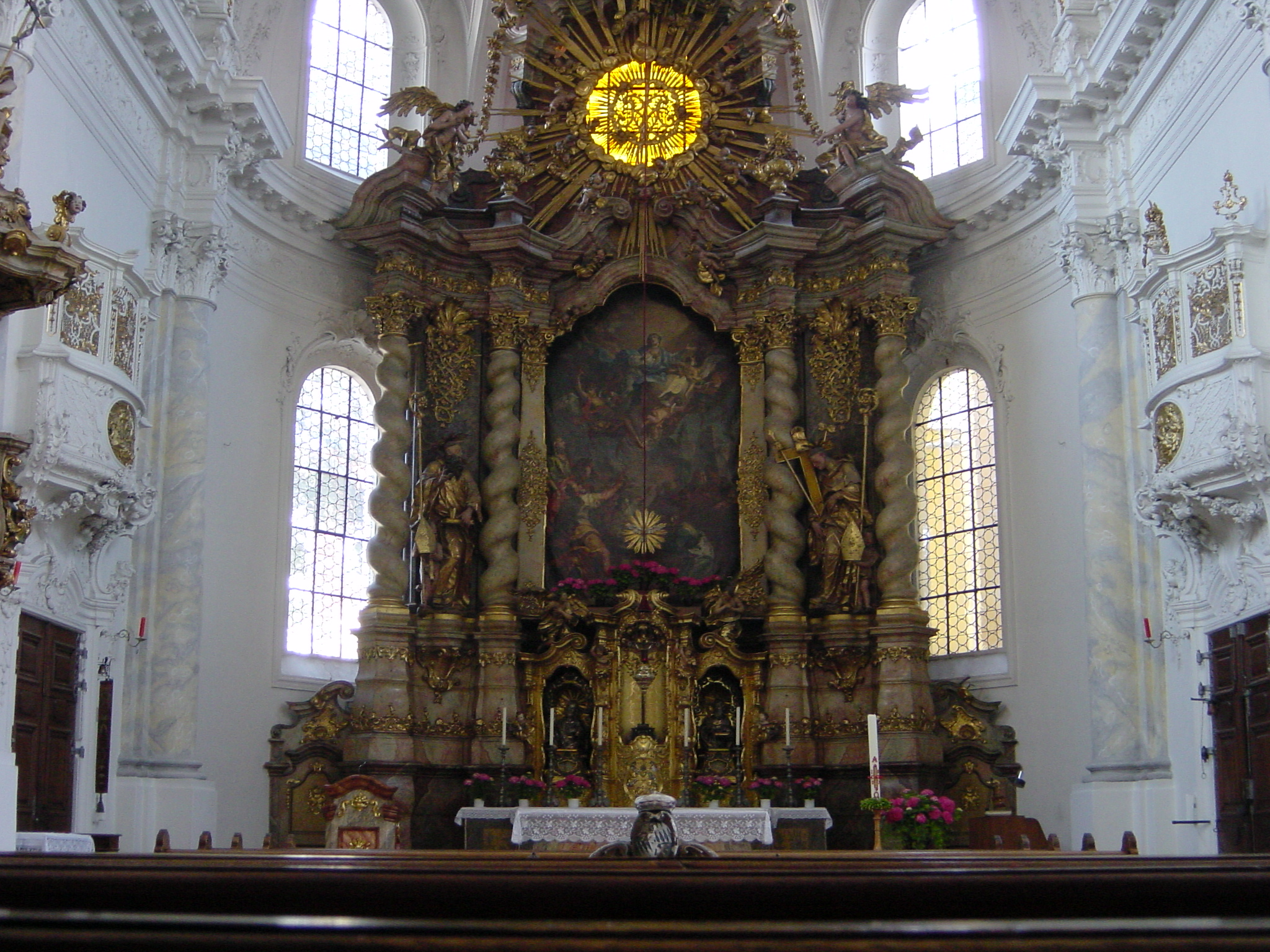 Hochaltar der Abteikirche von Kloster Seligenthal, Landshut, mit Gemälde von Johann Baptist Zimmermann